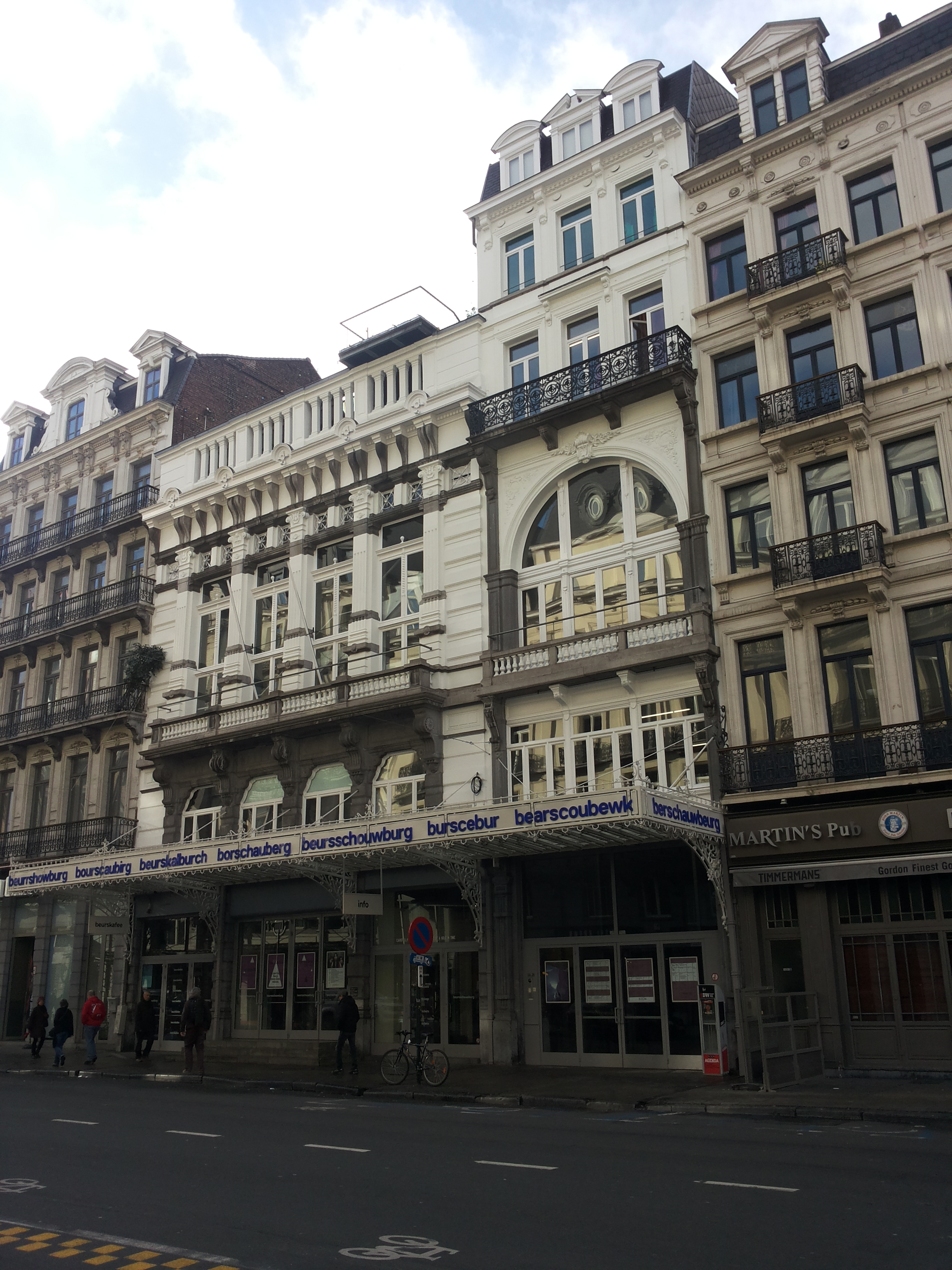 Beursschouwburg, Brussel, België